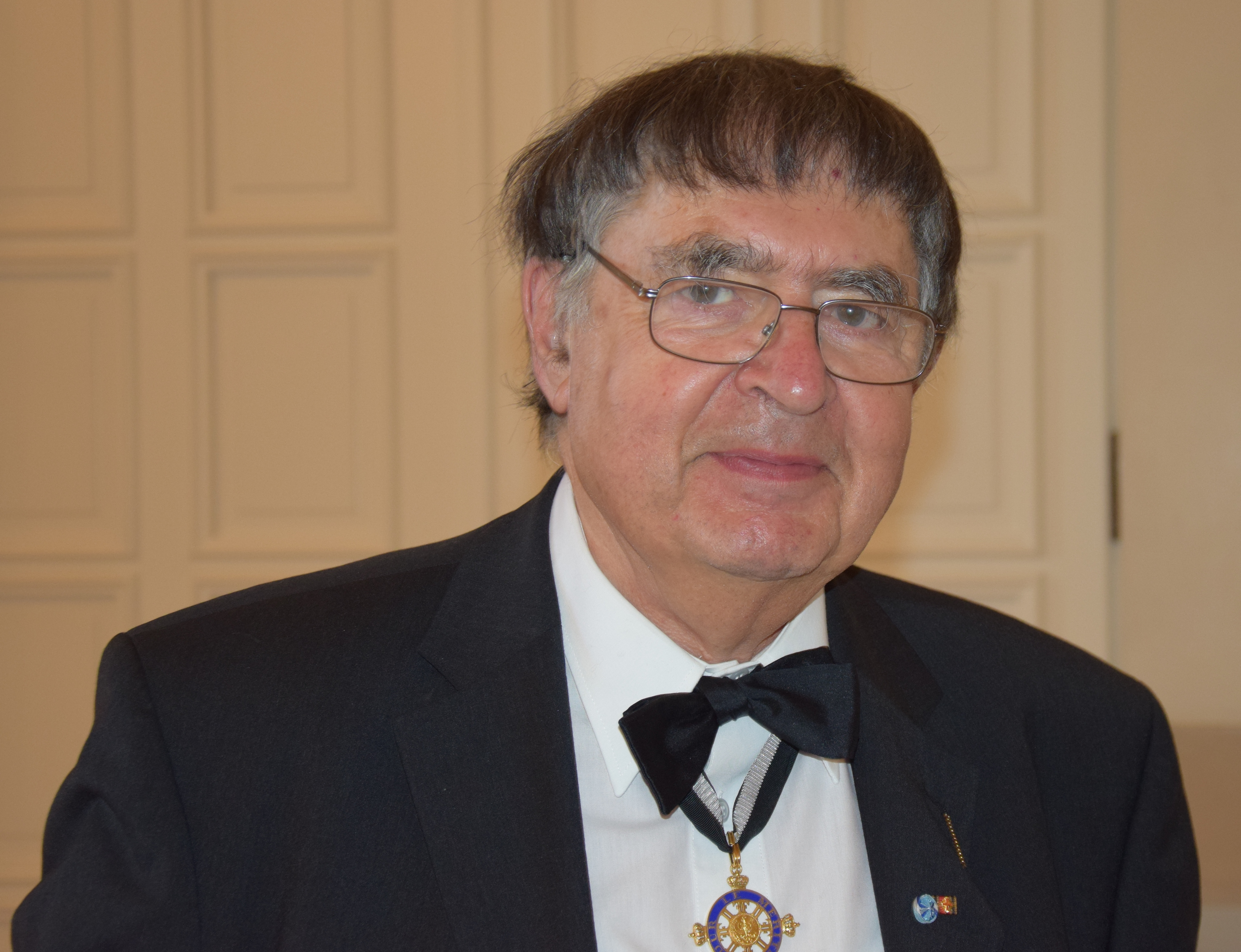 Öffentliche Sitzung der Mitglieder des Ordens Pour le mérite für Wissenschaften und Künste 2014 im Konzerthaus am Gendarmenmarkt in Berlin